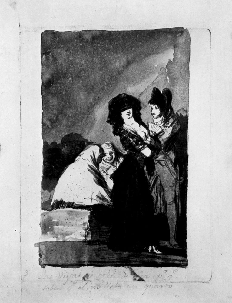 Dibujo preparatorio del capricho nª 5.